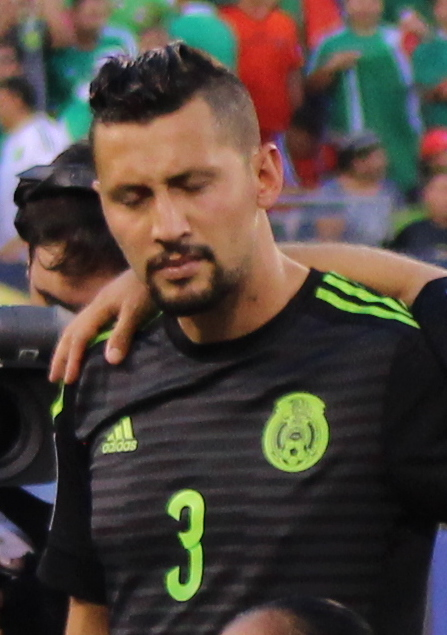 Mexico's Men's National Team